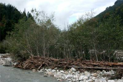 Bachauwald am Halblech im Ammergebirge/Ostallgäu aus Grauerlen und Weiden.